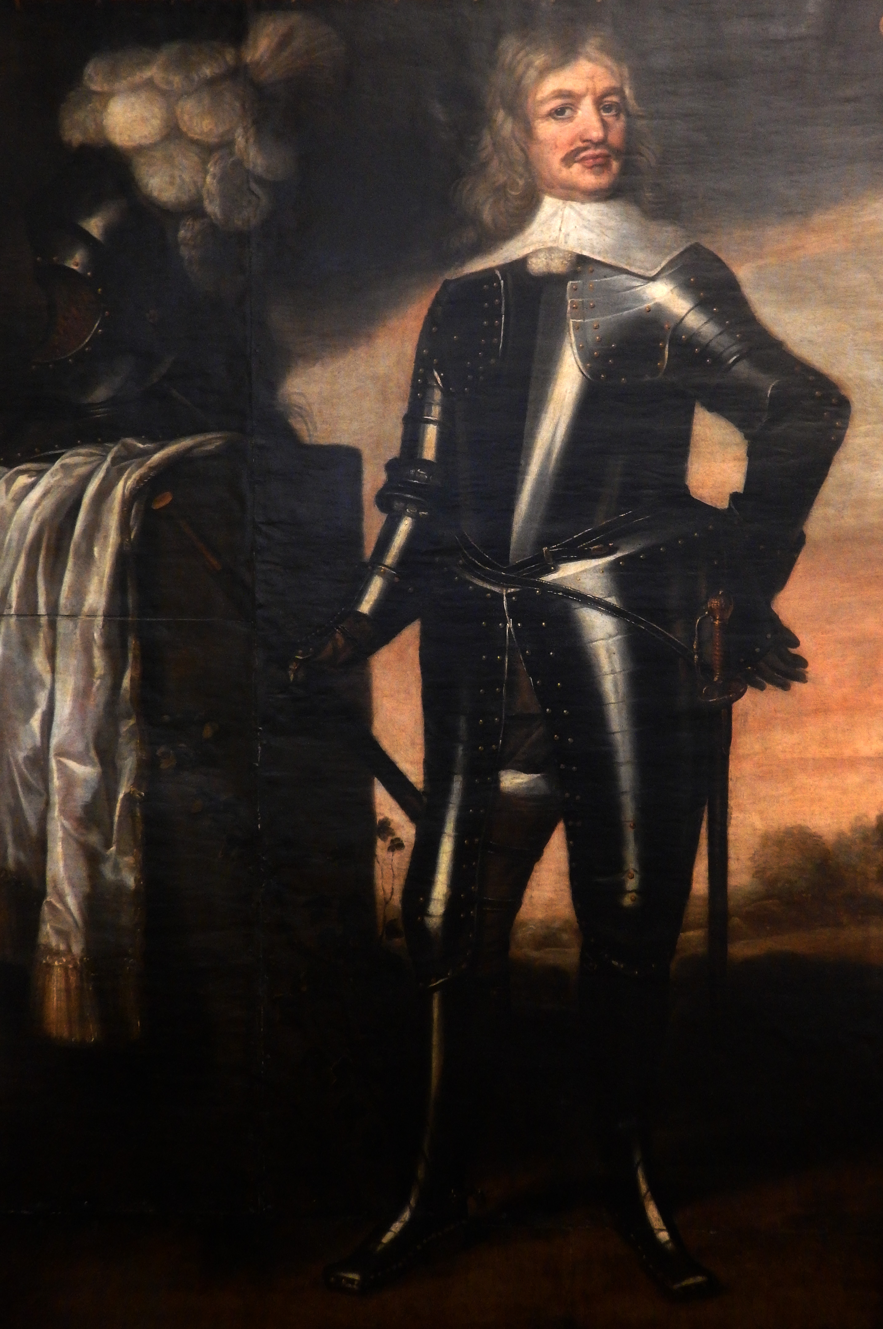 Portrait von Graf Otto Christoph von Sparr.